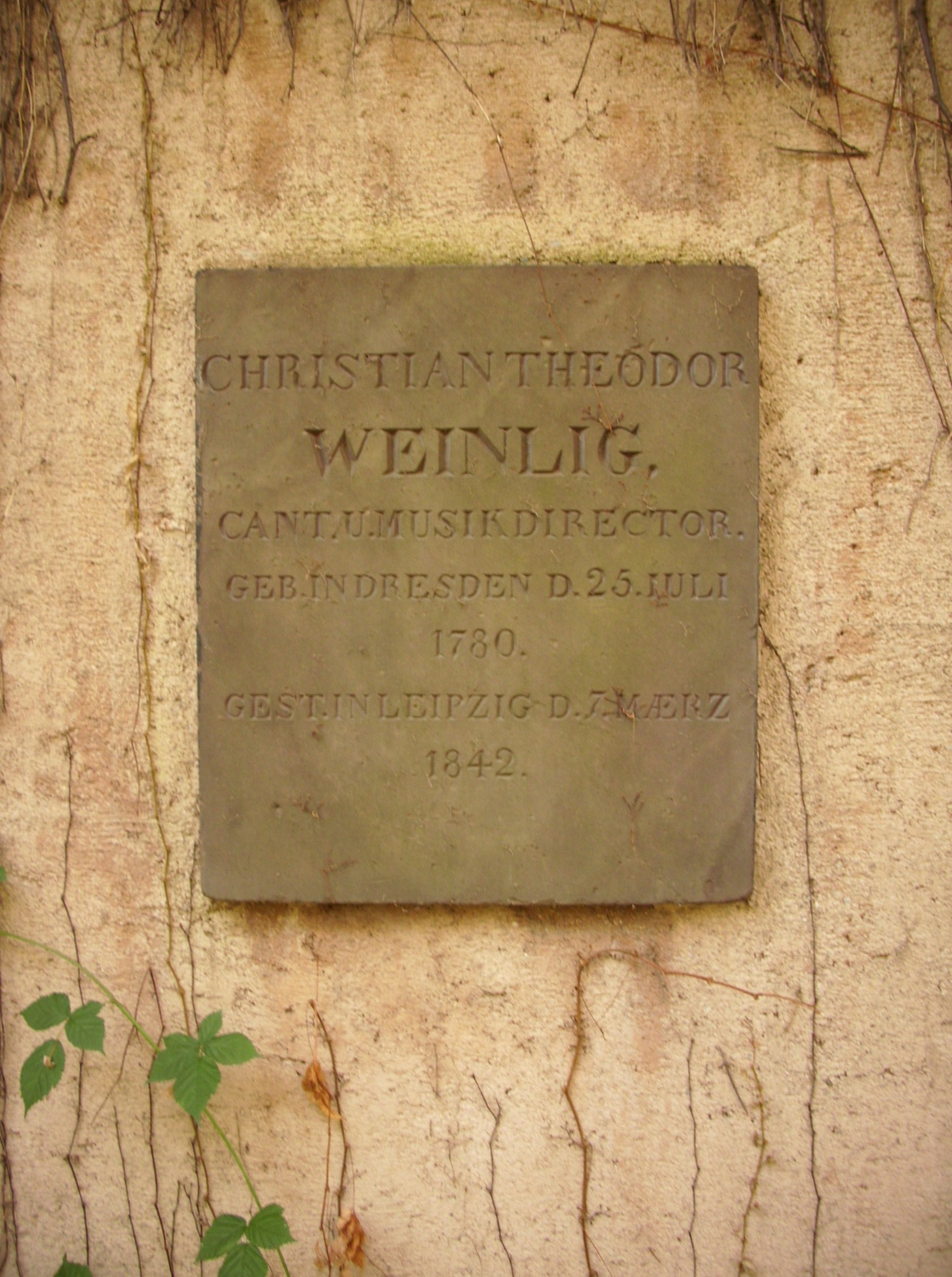 Grabtafel Christian Theodor Weinlig, Alter Johannisfriedhof Leipzig